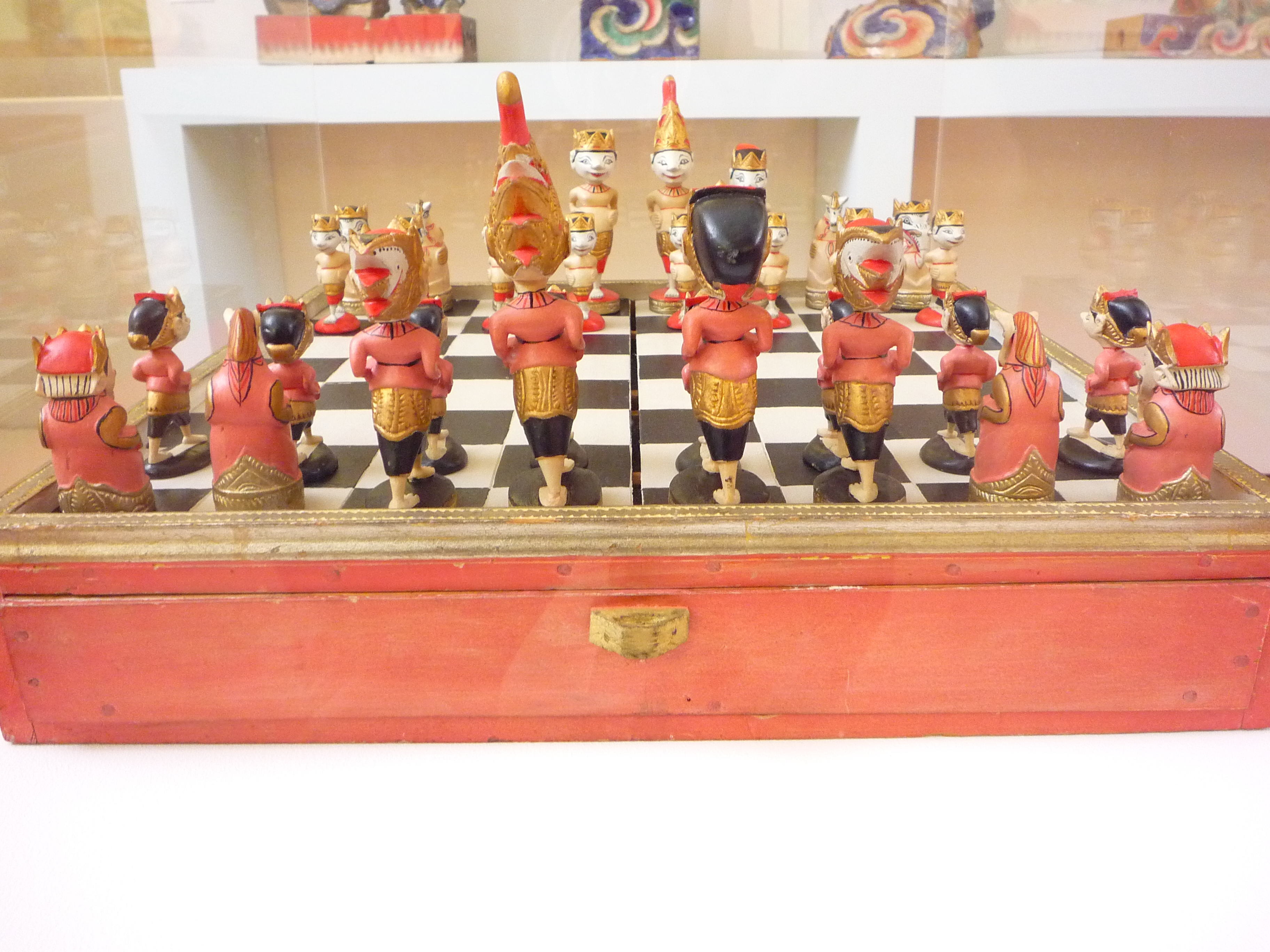 Jeu d'échecs, Java, XIXe siècle, bois peint laqué, don du général Léon de Beylié en 1905 au Musée de Grenoble.